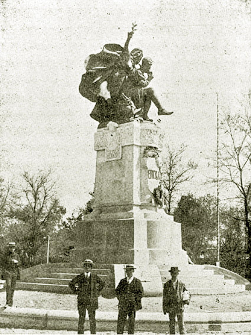 Estaua de Alonso de Ercilla en Santiago de Chile en el año de su inauguración (1910).